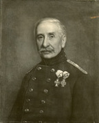 Waldemar Nicolai Bryggemann Beichmann (1783-1862), Danish general